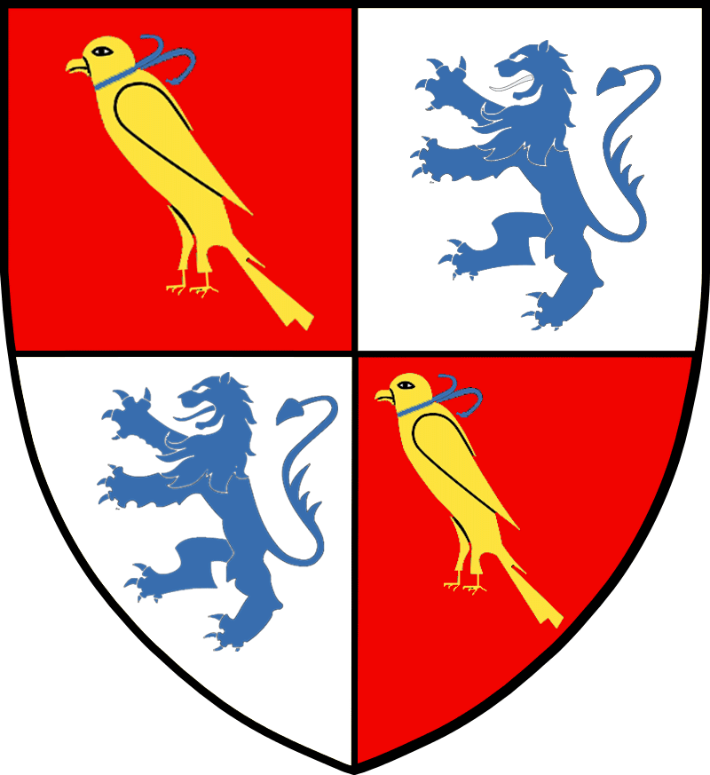 Vapensköld för adelsätten Falkenskiold